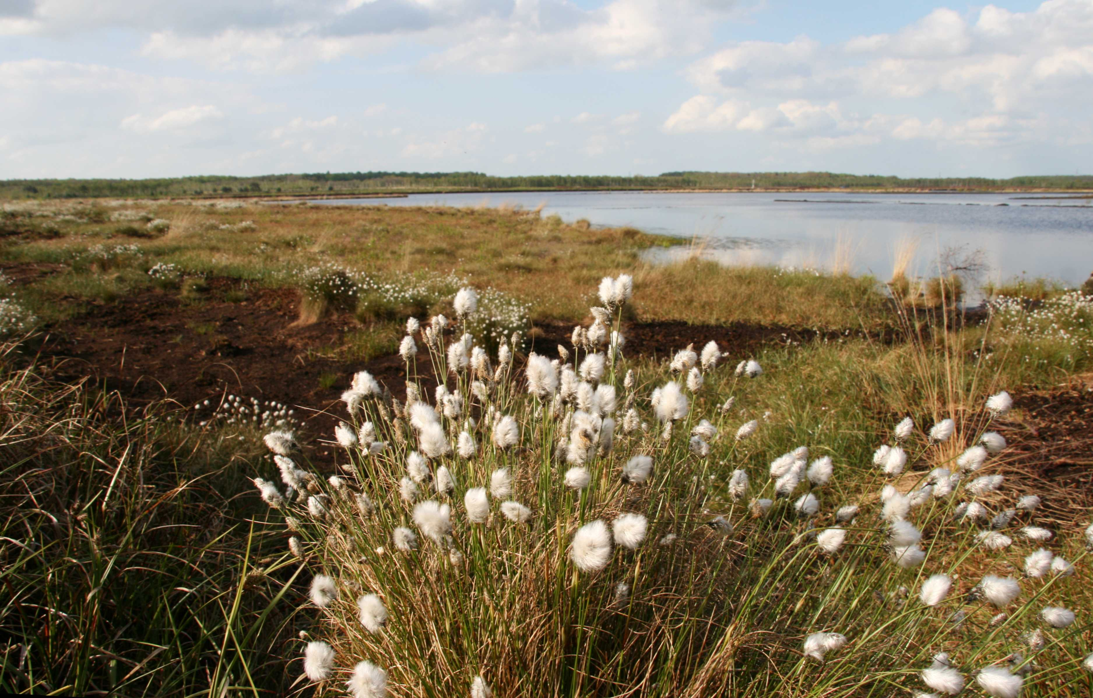 Wollgras (Eriophorum sp.) im Himmelmoor bei Quickborn, Kreis Pinneberg, Schleswig-Holstein. Bereich im Landschaftsschutzgebiet „LSG des Kreises Pinneberg“ (LSG 01).